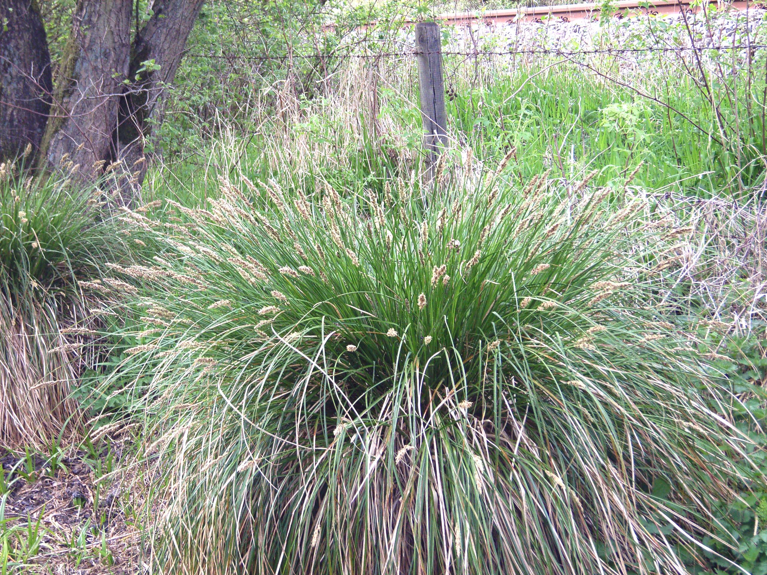 Rispen-Segge (Carex paniculata), Horst (tussock), Nordwestdeutschland